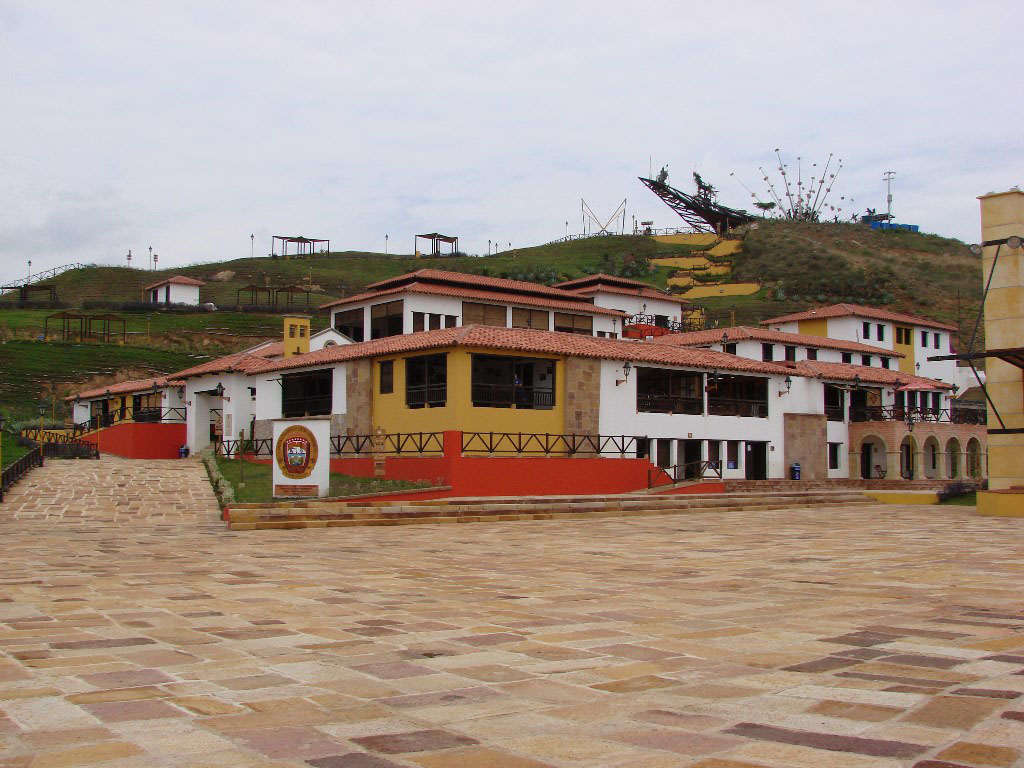 Categoria: Parques de Colombia